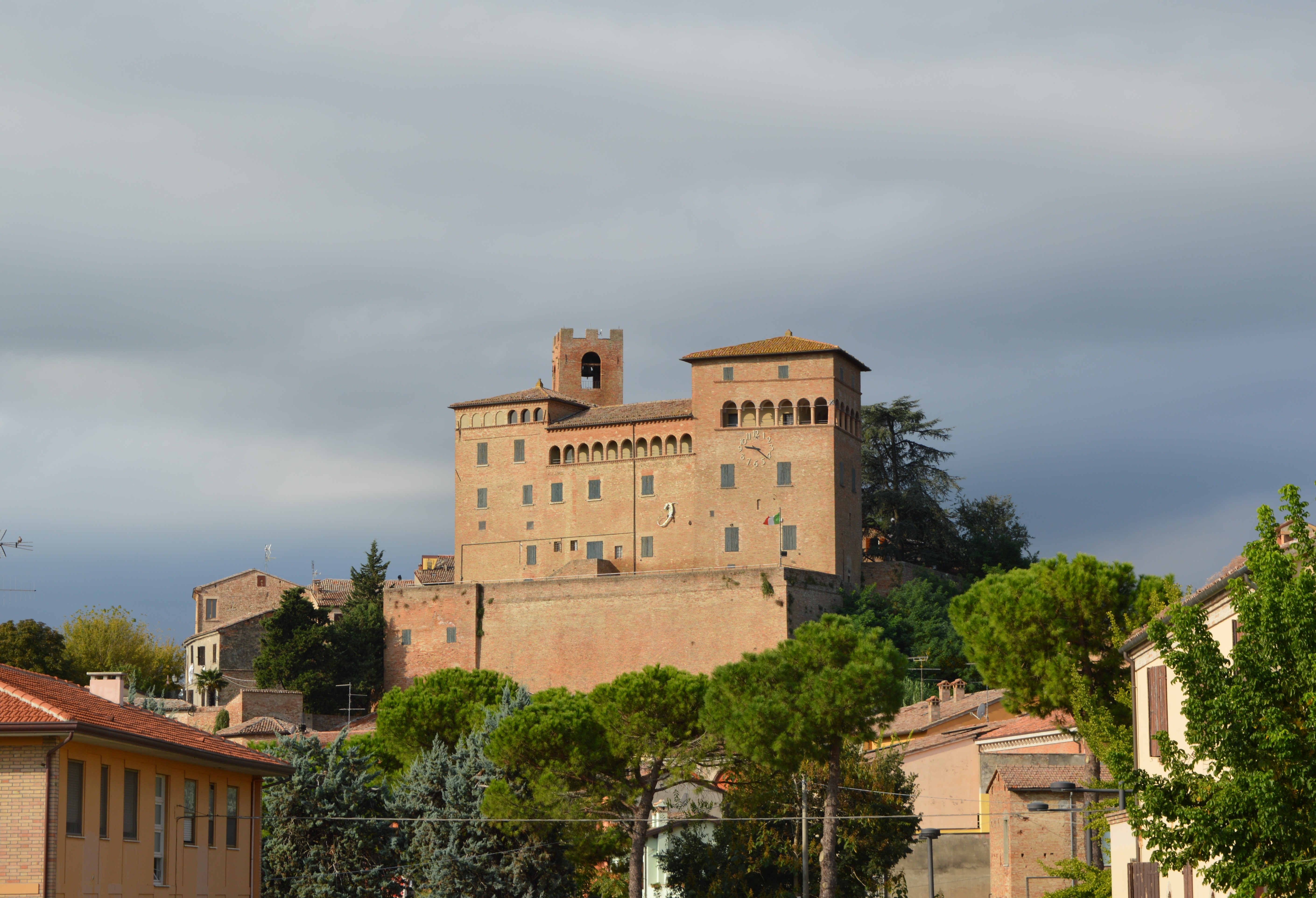 Castello Malatestiano This is a photo of a monument which is part of cultural heritage of Italy.